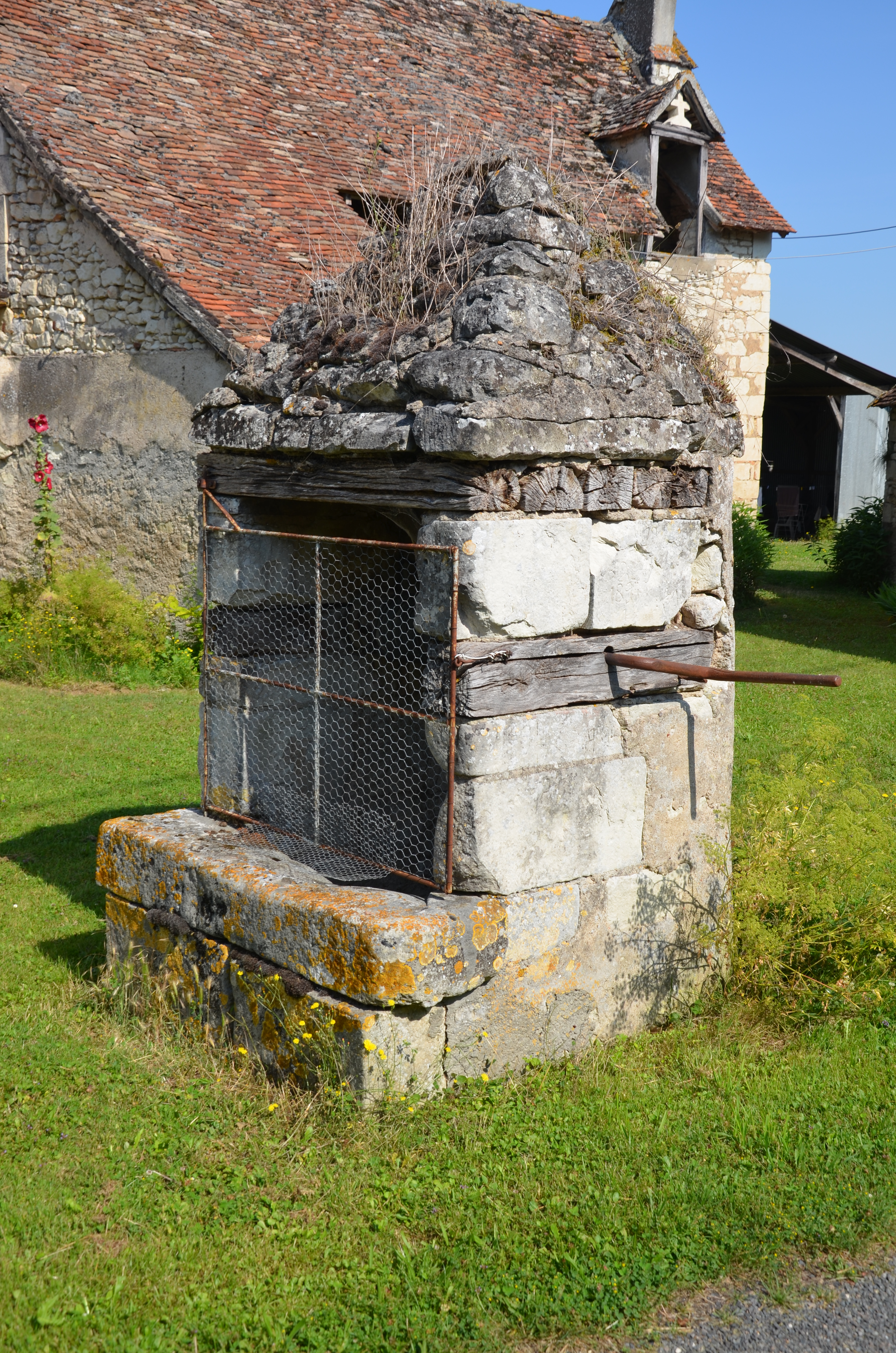 Puits maçonné à Boussay en Indre-et-Loire (France).